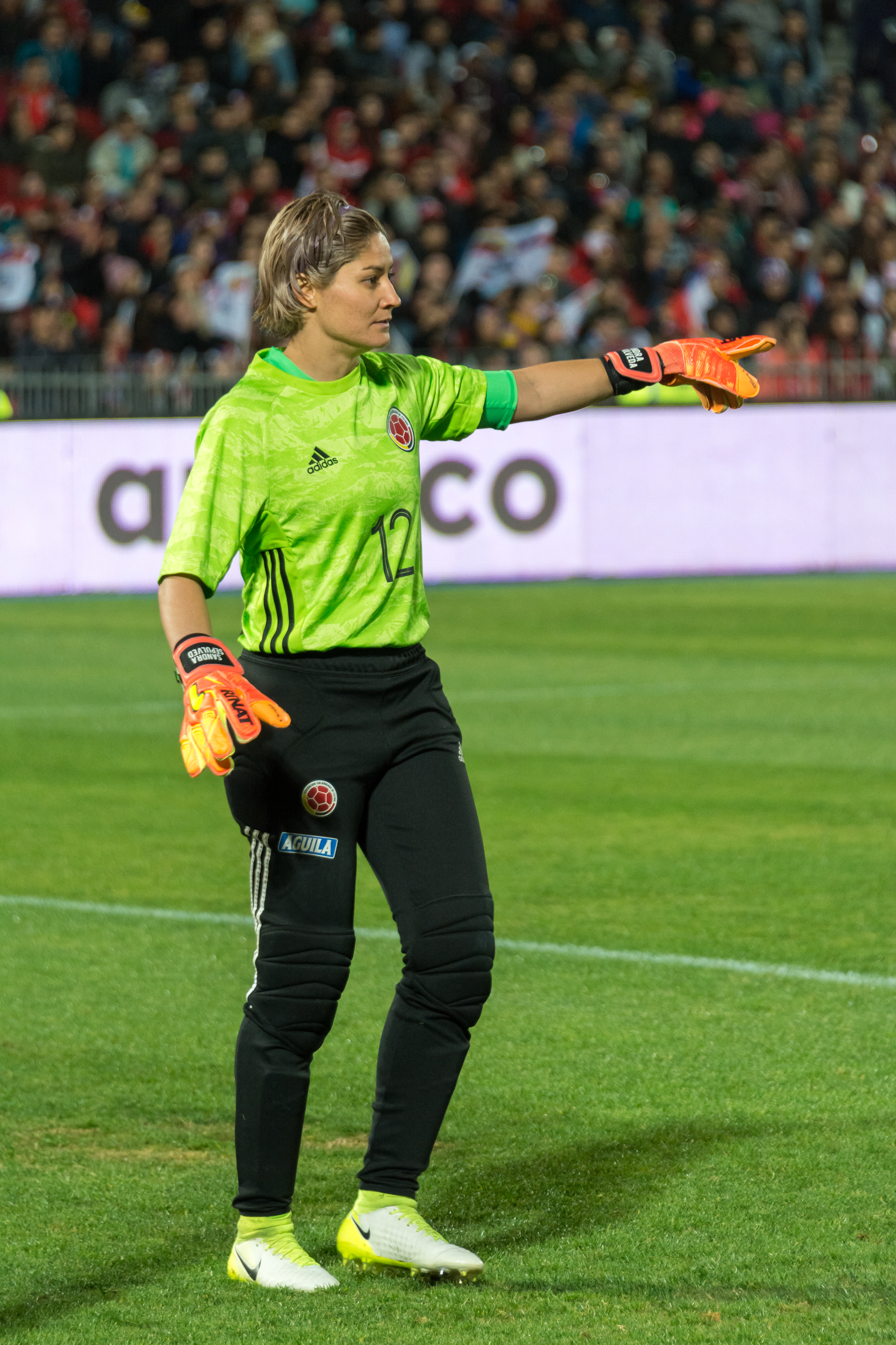 Sandra Sepúlveda, Chile v Colombia, Estadio Nacional, Ñuñoa, Santiago, Chile.